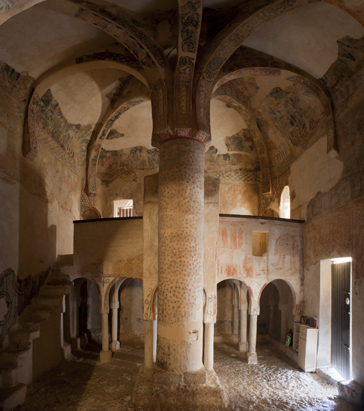 Ermita de San Baudelio de Berlanga